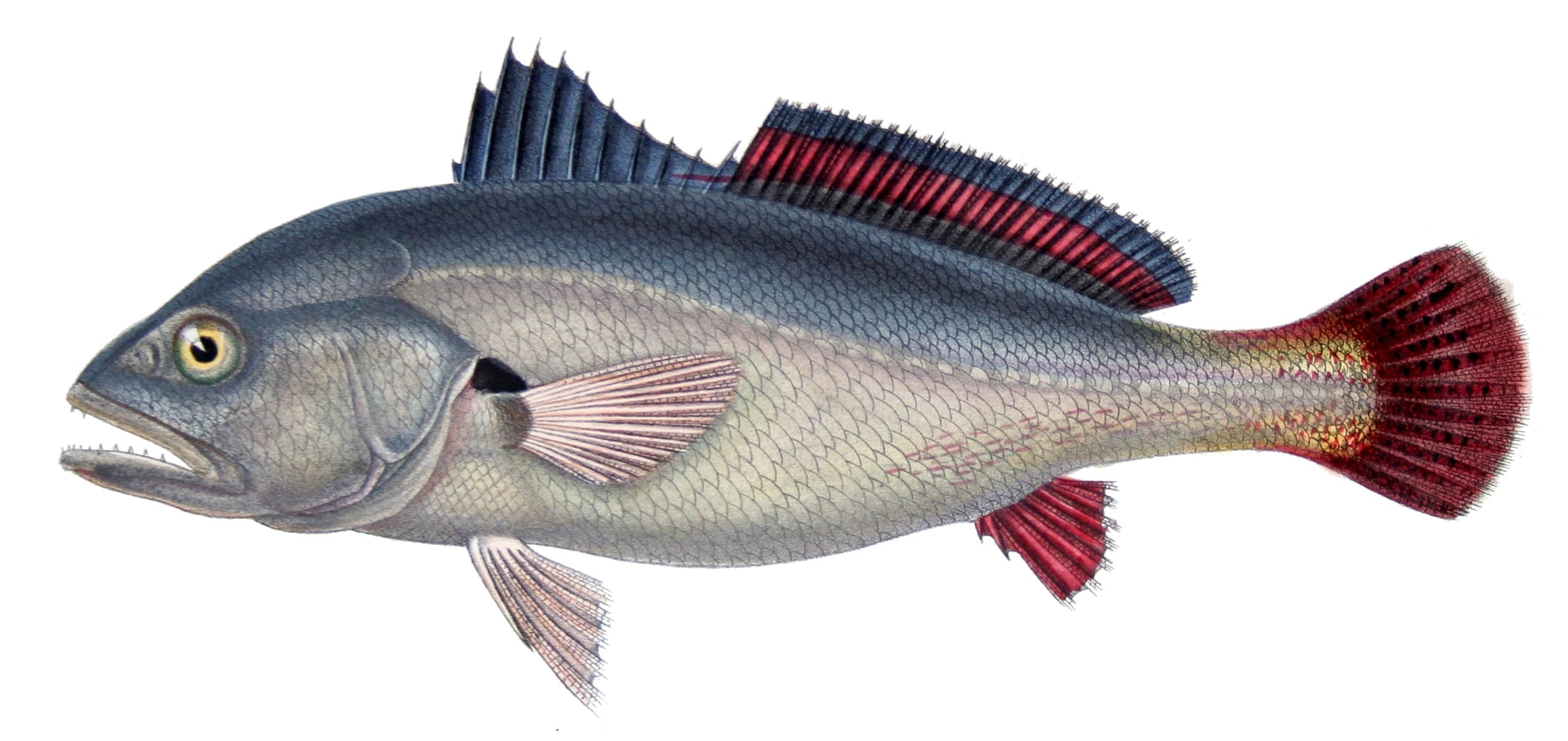 Johnius crouvina Cast. = Plagioscion squamosissimus (Heckel, 1840)